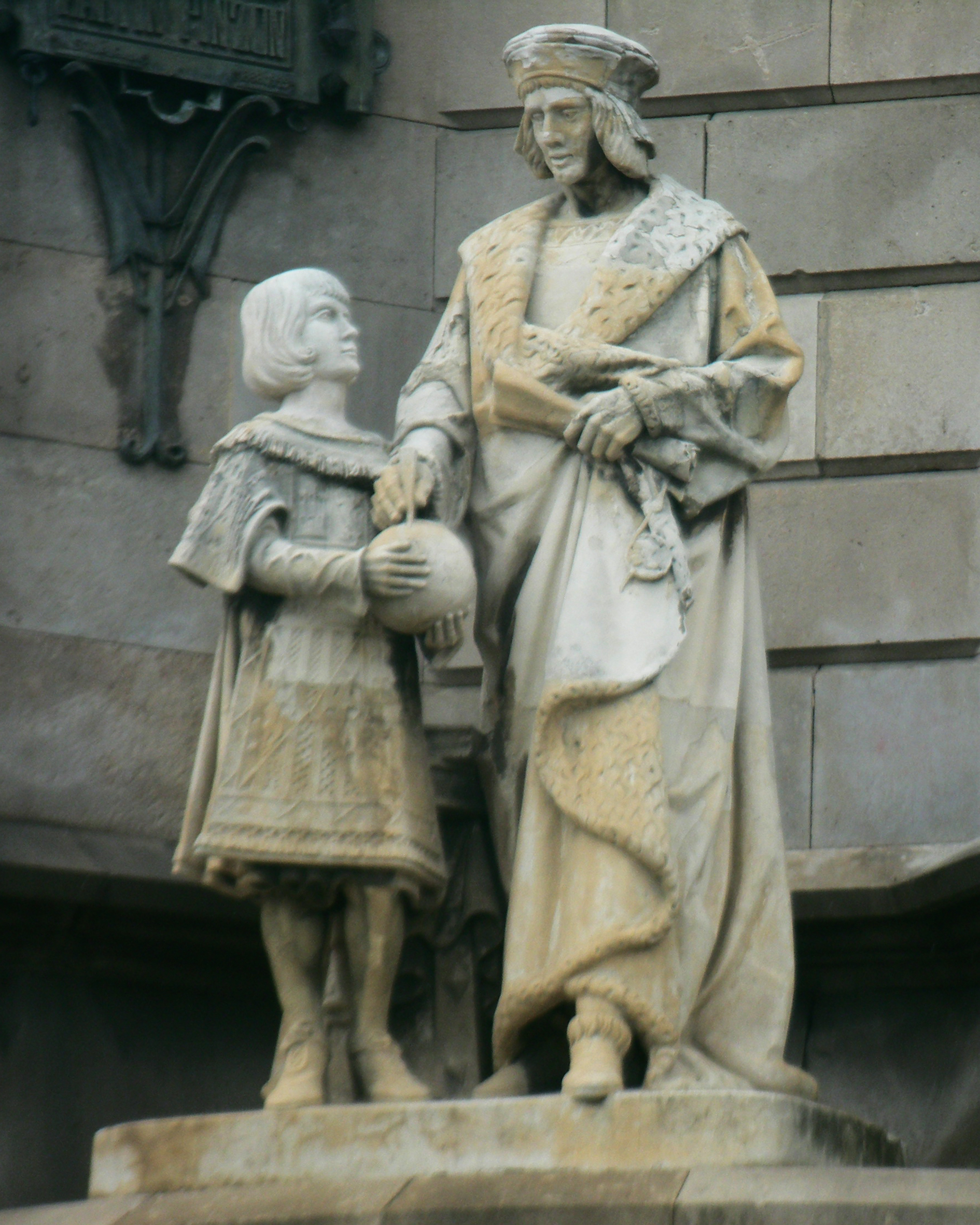 Jaume Ferrer mestre d'en Cristòfor Colom. Estatues al Monument a Colom de Barcelona